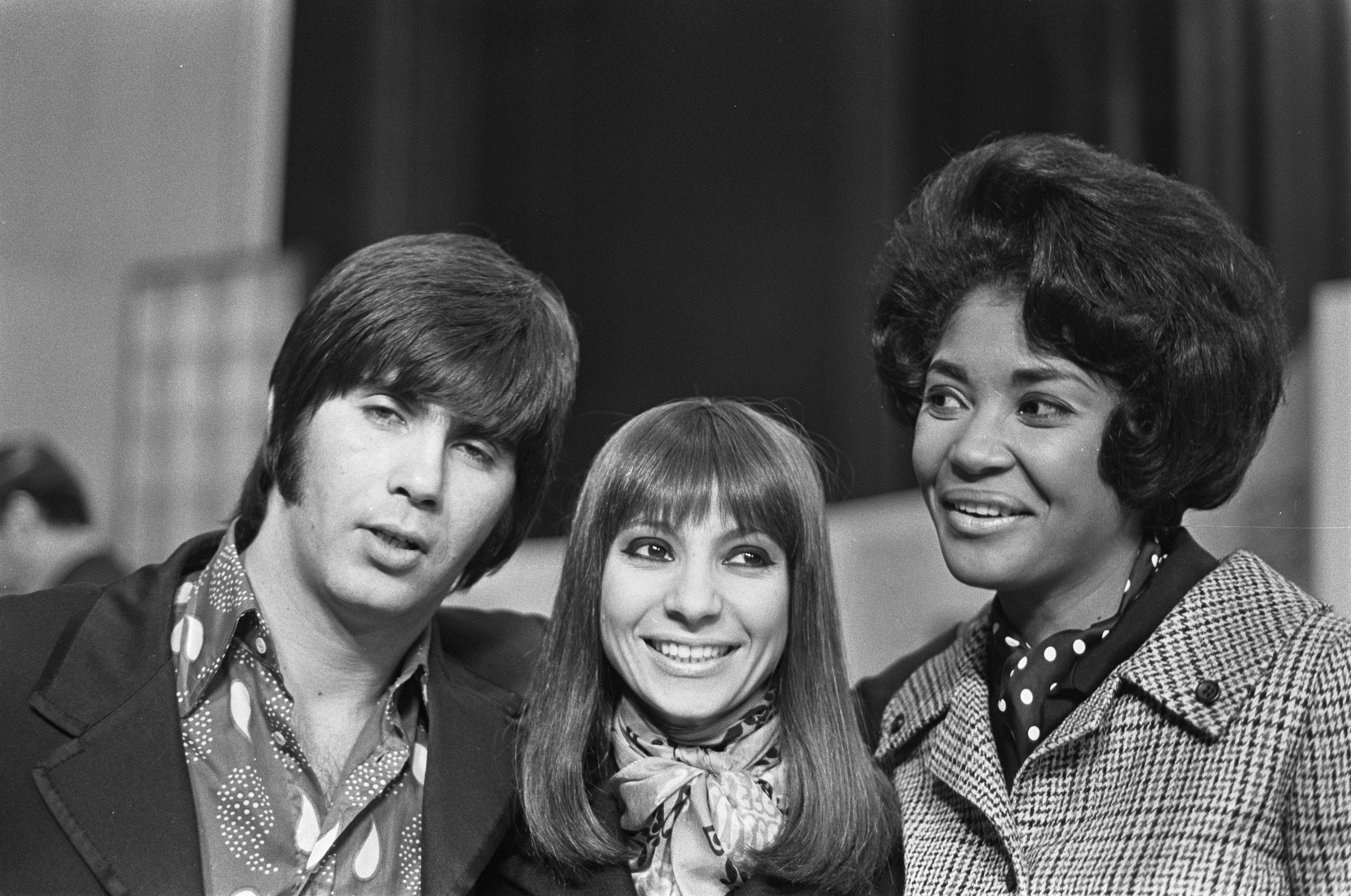 Collectie / Archief : Fotocollectie Anefo Reportage / Serie : Grand Gala du Disque 1968 Beschrijving : Grand Gala du Disque in RAI. Abraham en Ester Ofarim en Nancy Wilson Datum : 6 maart 1968 Locatie : Amsterdam Trefwoorden : portretten, zangers Persoonsnaam : Ofarim, Abi, Ofarim, Esther, Wilson, Nancy Fotograaf : Nijs, Jac. de / Anefo Auteursrechthebbende : Nationaal Archief Materiaalsoort : Negatief (zwart/wit) Nummer archiefinventaris : bekijk toegang 2.24.01.05 Bestanddeelnummer : 921-1407 Reacties Geplaatst door Maaike op 02 oktober 2013 - 04:39. Esther Ofarim Geplaatst door Maaike op 07 maart 2014 - 21:31. Locatie: RAI-congrescentrum Plaats: Amsterdam, Noord-Holland